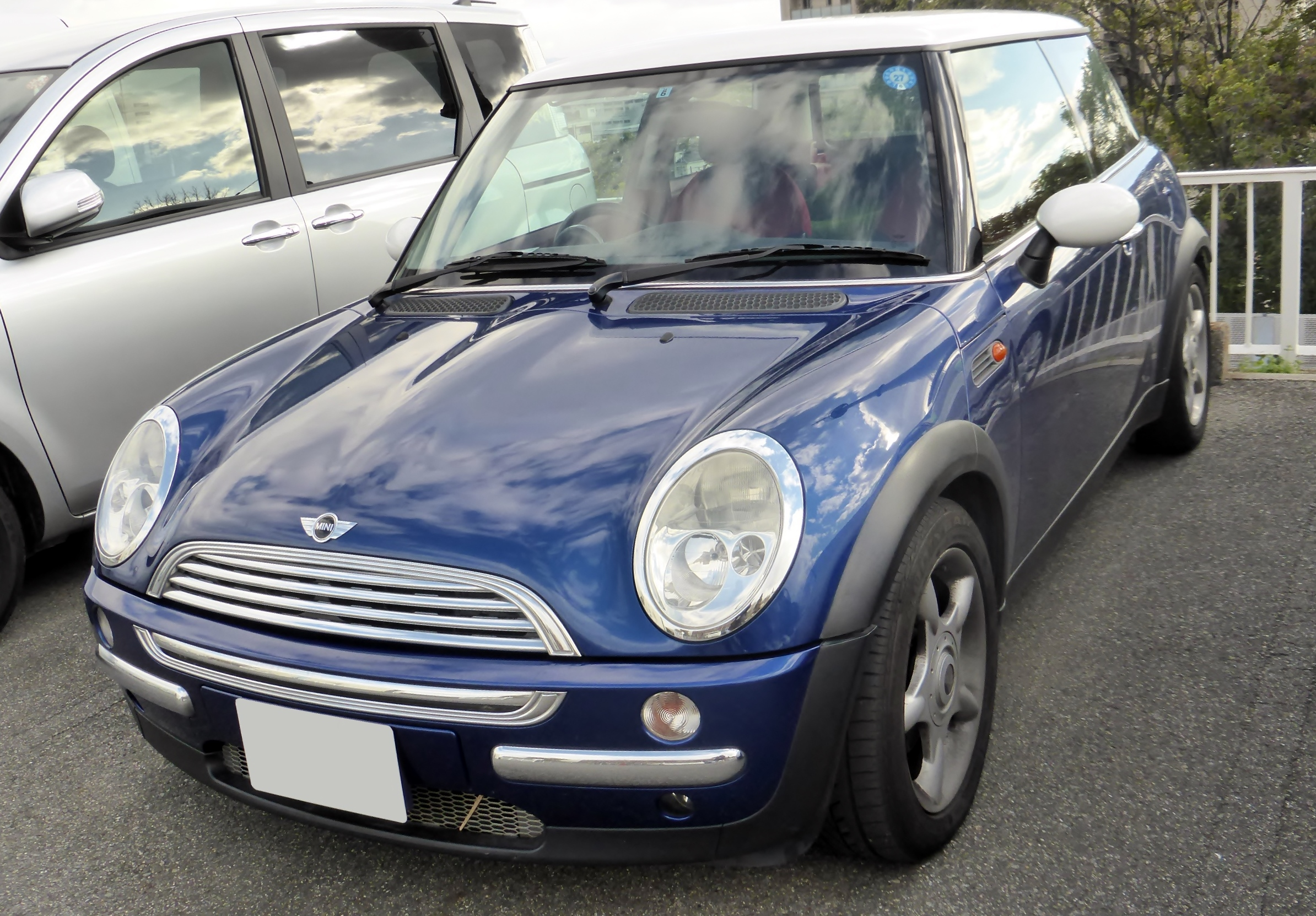 R50型BMW・ミニクーパーをフロントから撮影。